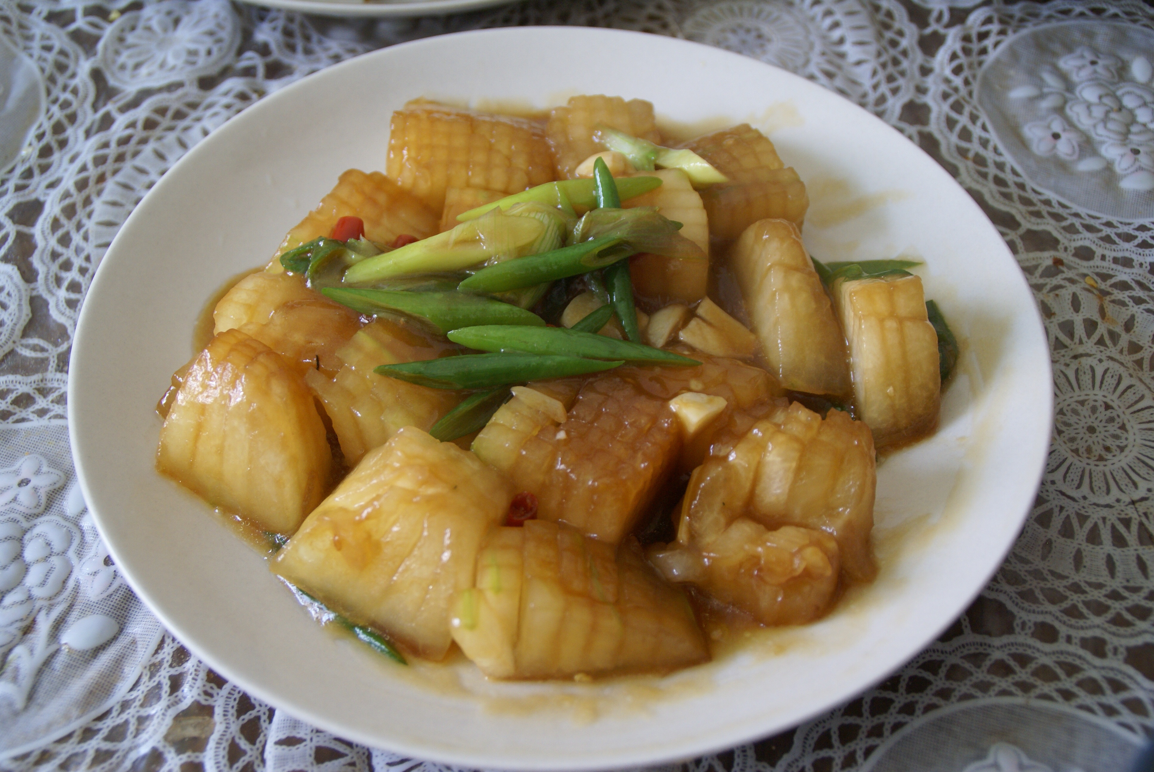 Wintermelone